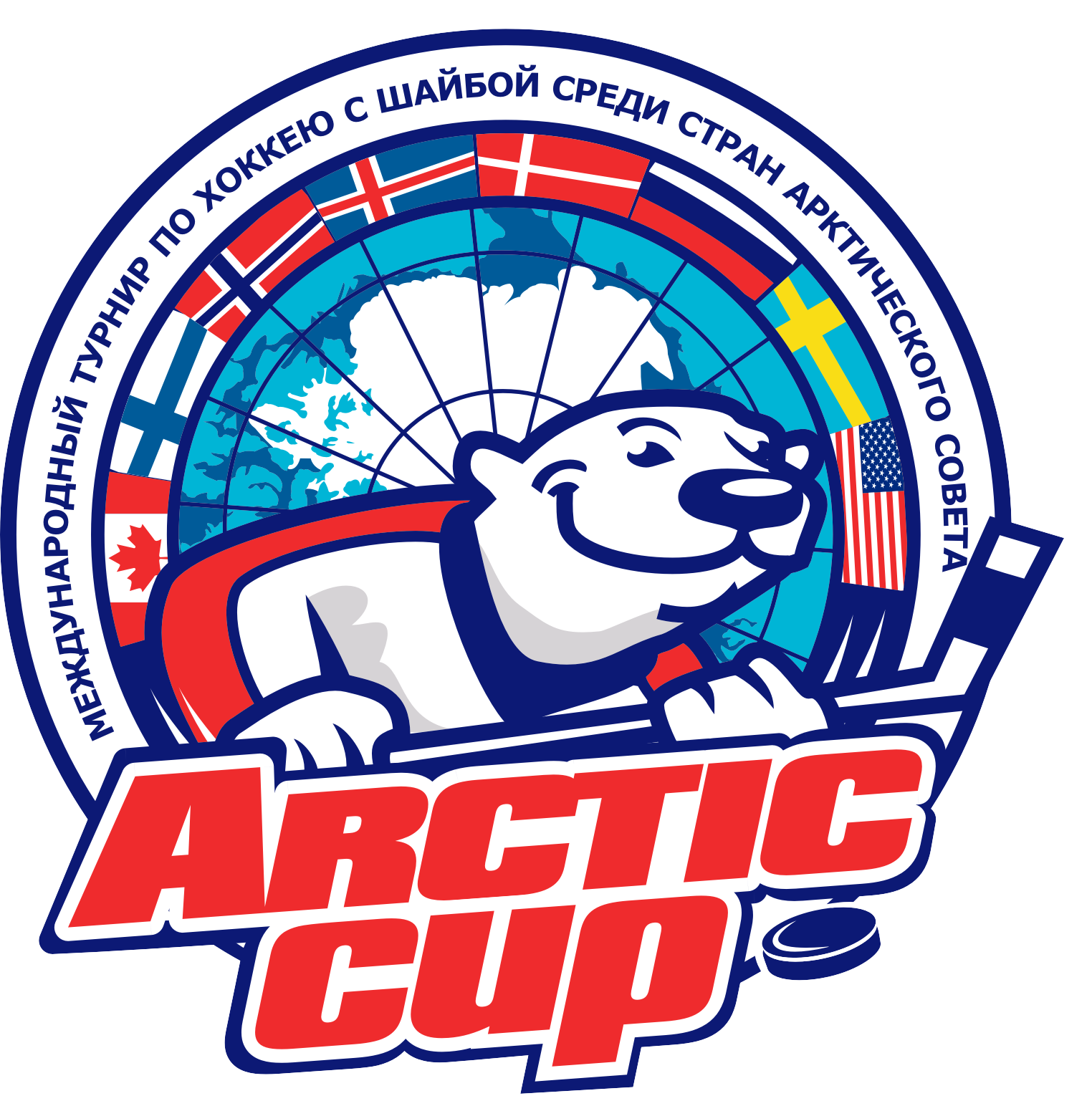 Логотип международного турнира по хоккею с шайбой Arctic Cup This work is free and may be used by anyone for any purpose. If you wish to use this content, you do not need to request permission as long as you follow any licensing requirements mentioned on this page.